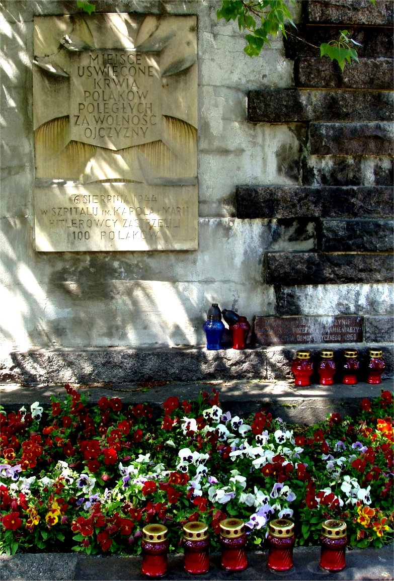 Tablica przy ul. Leszno w Warszawie (fot Zu)